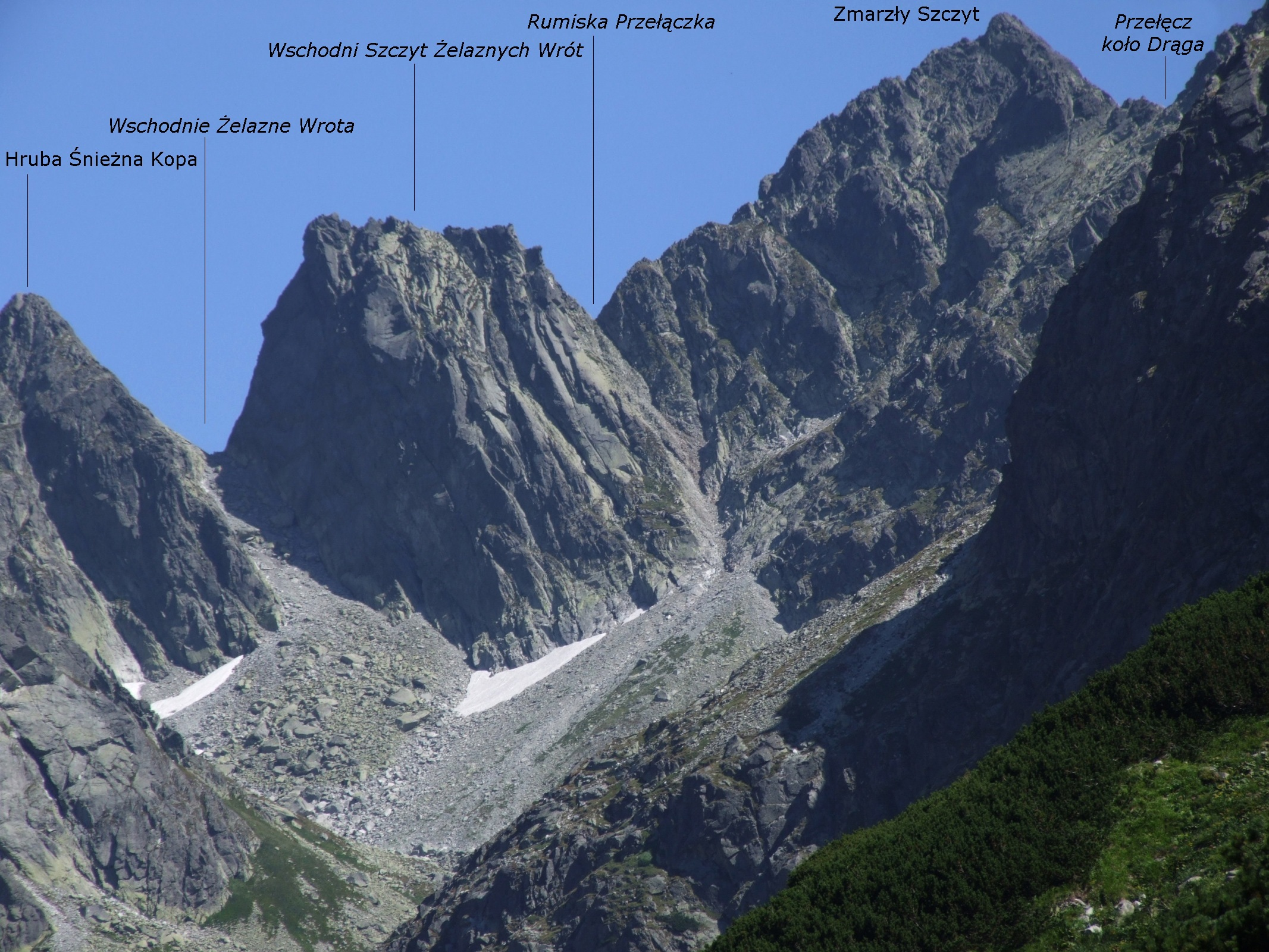 Widok od strony Doliny Złomisk